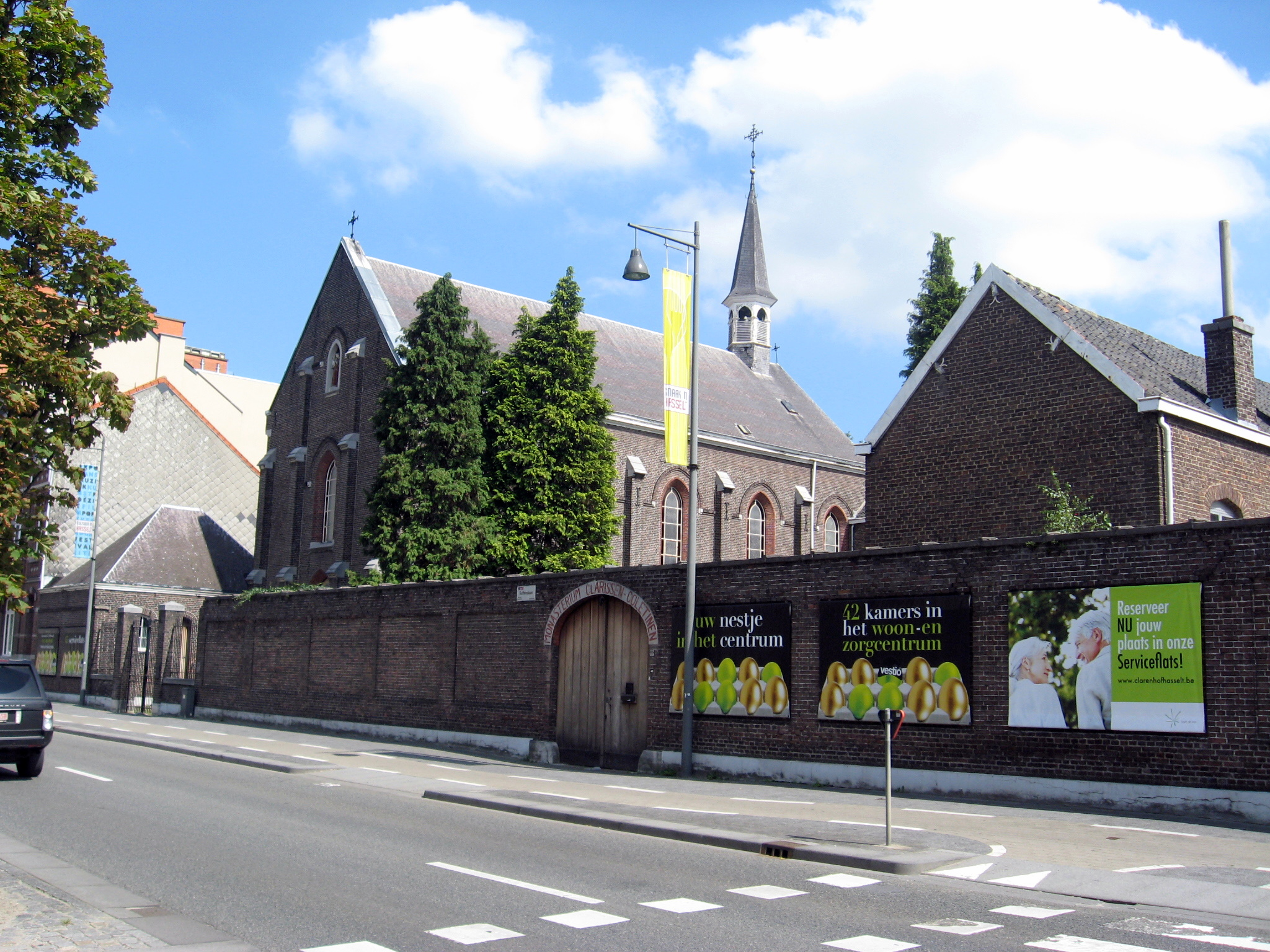 Voormalig klooster en kapel zusters clarissen-coletinen in Hasselt